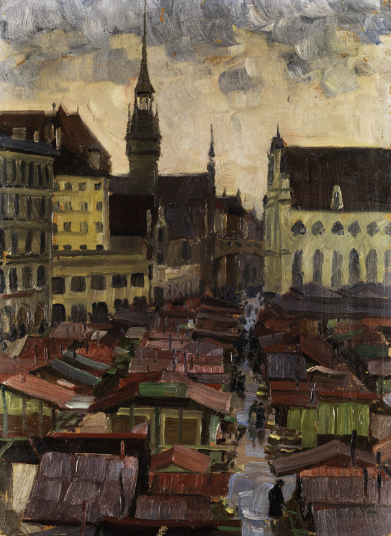 Der Viktualienmarkt in München, oil on canvas, 51 x 37 cm (Viktualienmarkt, Peterskiche, Altes Rathaus, Heiliggeistkirche)